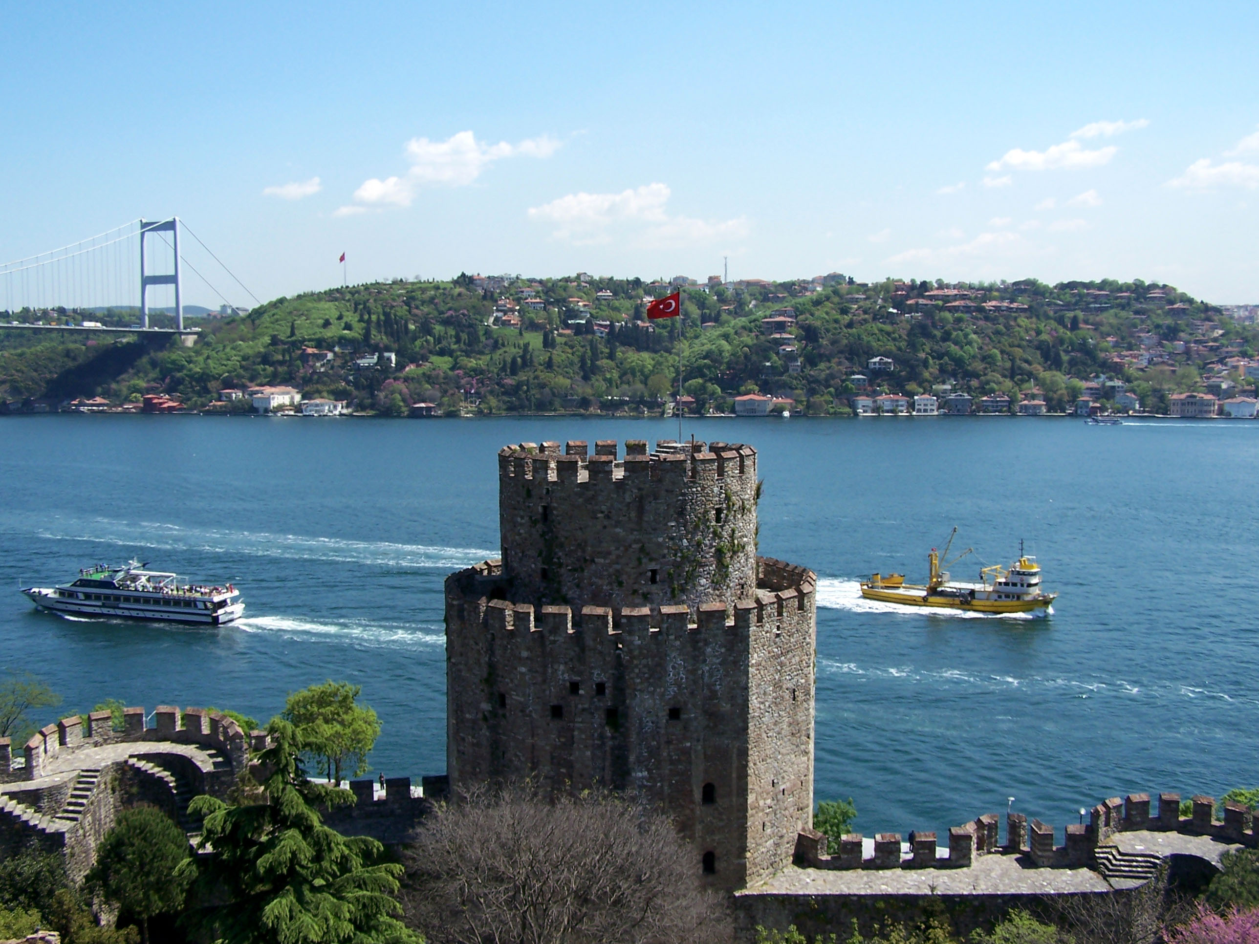 Halil Paşa Kulesi of Rumeli Hisarı